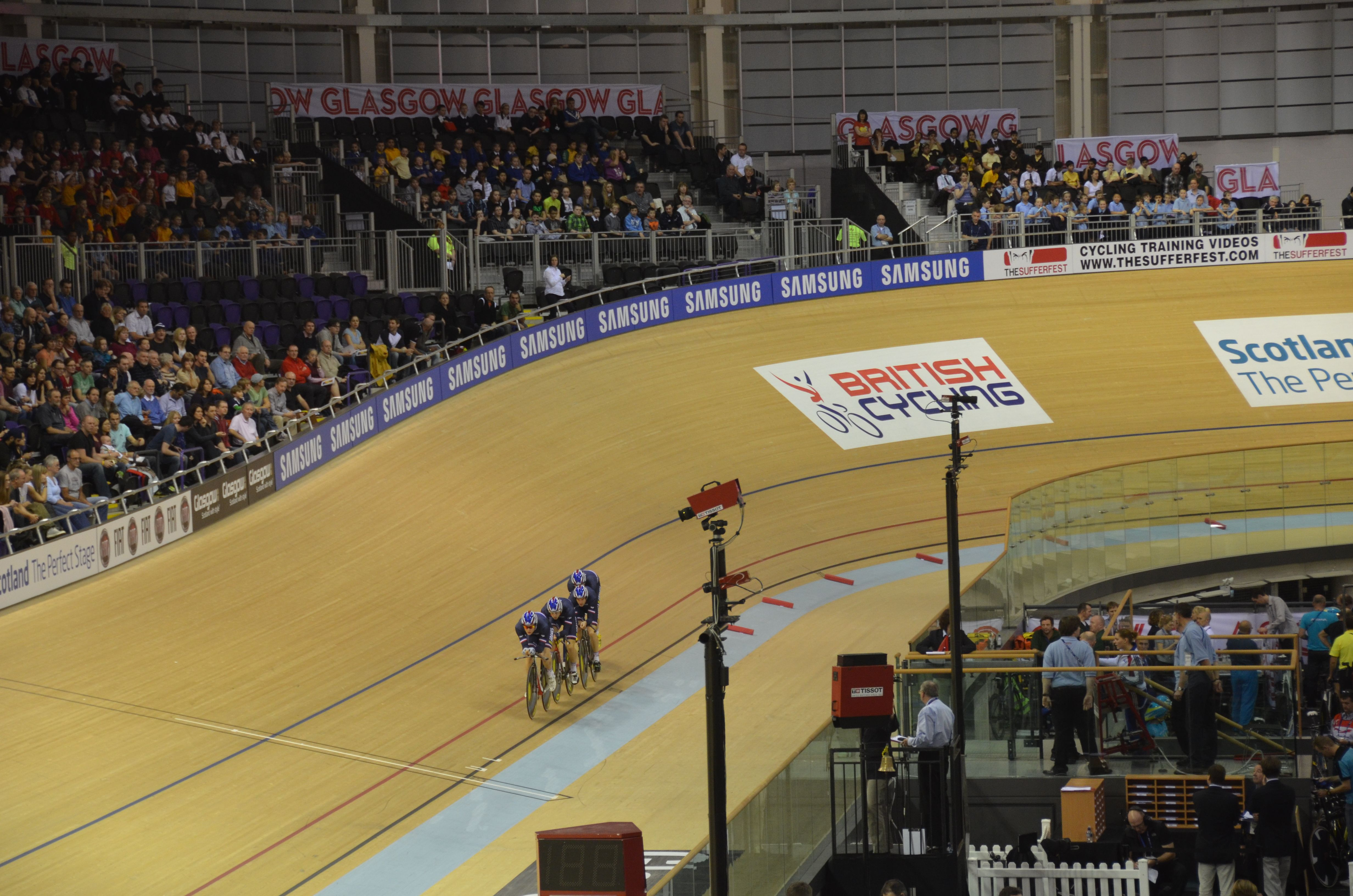 Bahnrad-Weltcup 2012